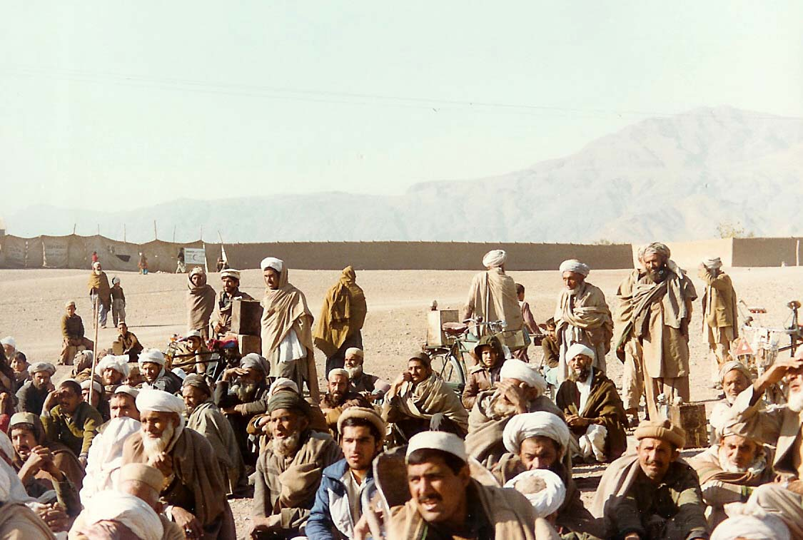 Wéi Hierken an enger Tonn (1987).